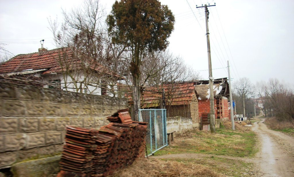 Ćukovac